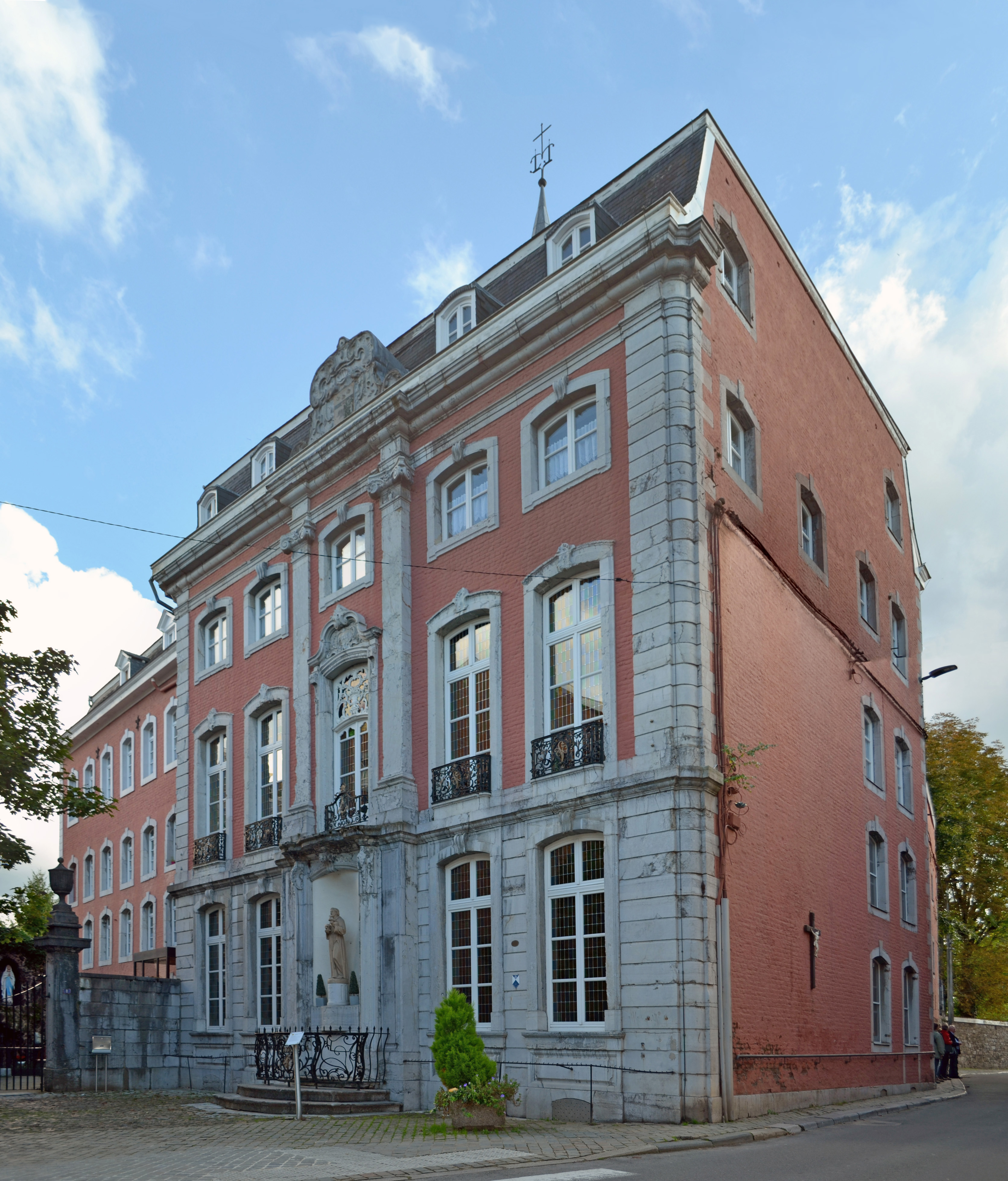 Franziskanerinnenkloster Eupen (Haus Vercken), Straßenfront